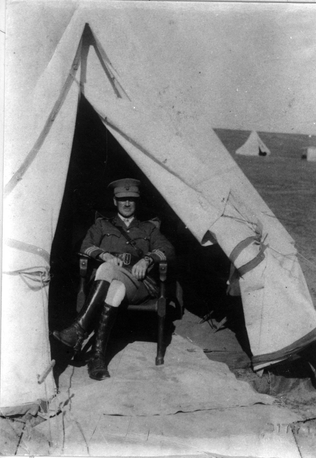 הקולונל ג'ון הנרי פטרסון יושב בפתח האוהל, 1917